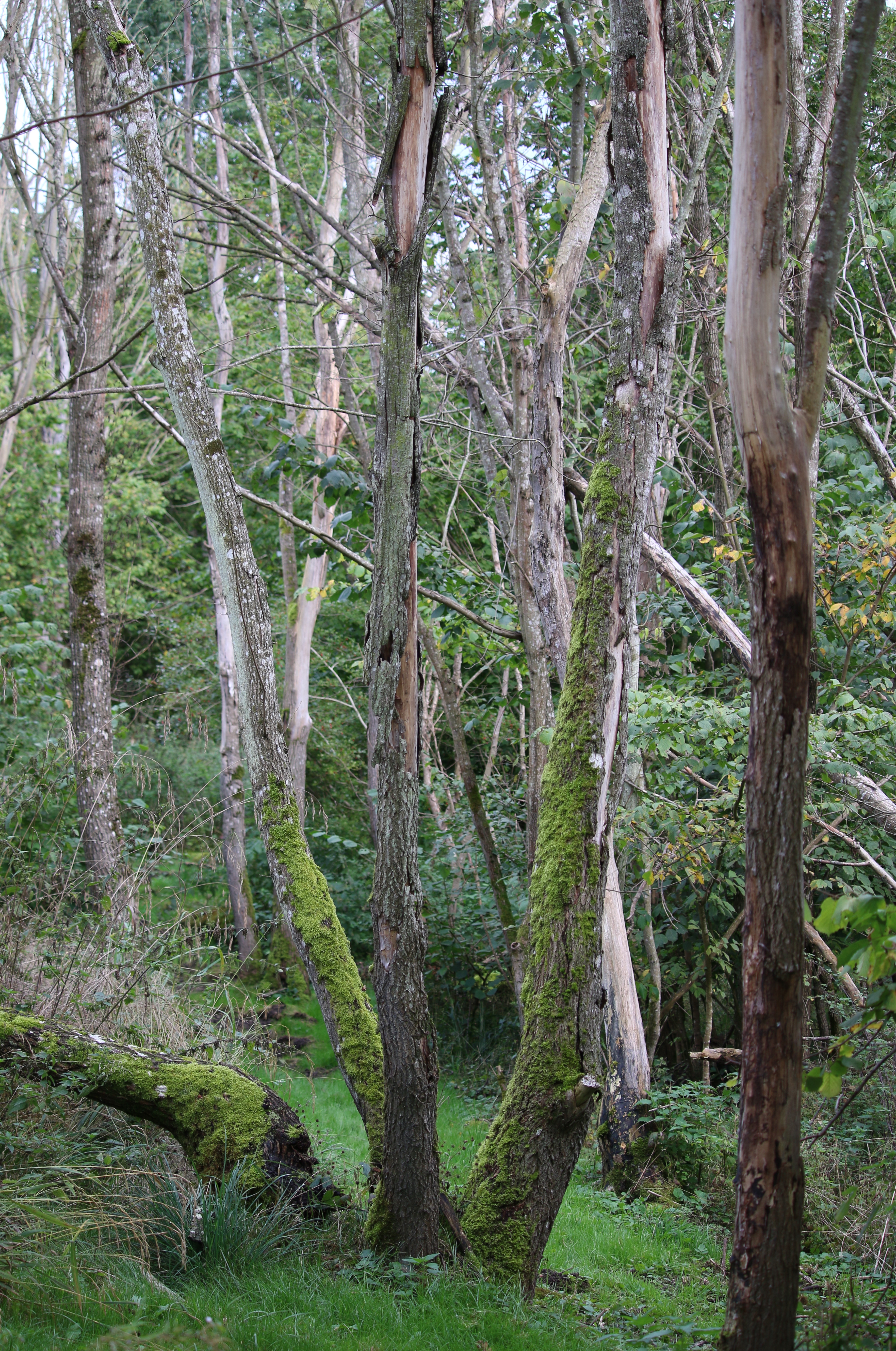 Örups almskog, Skåne